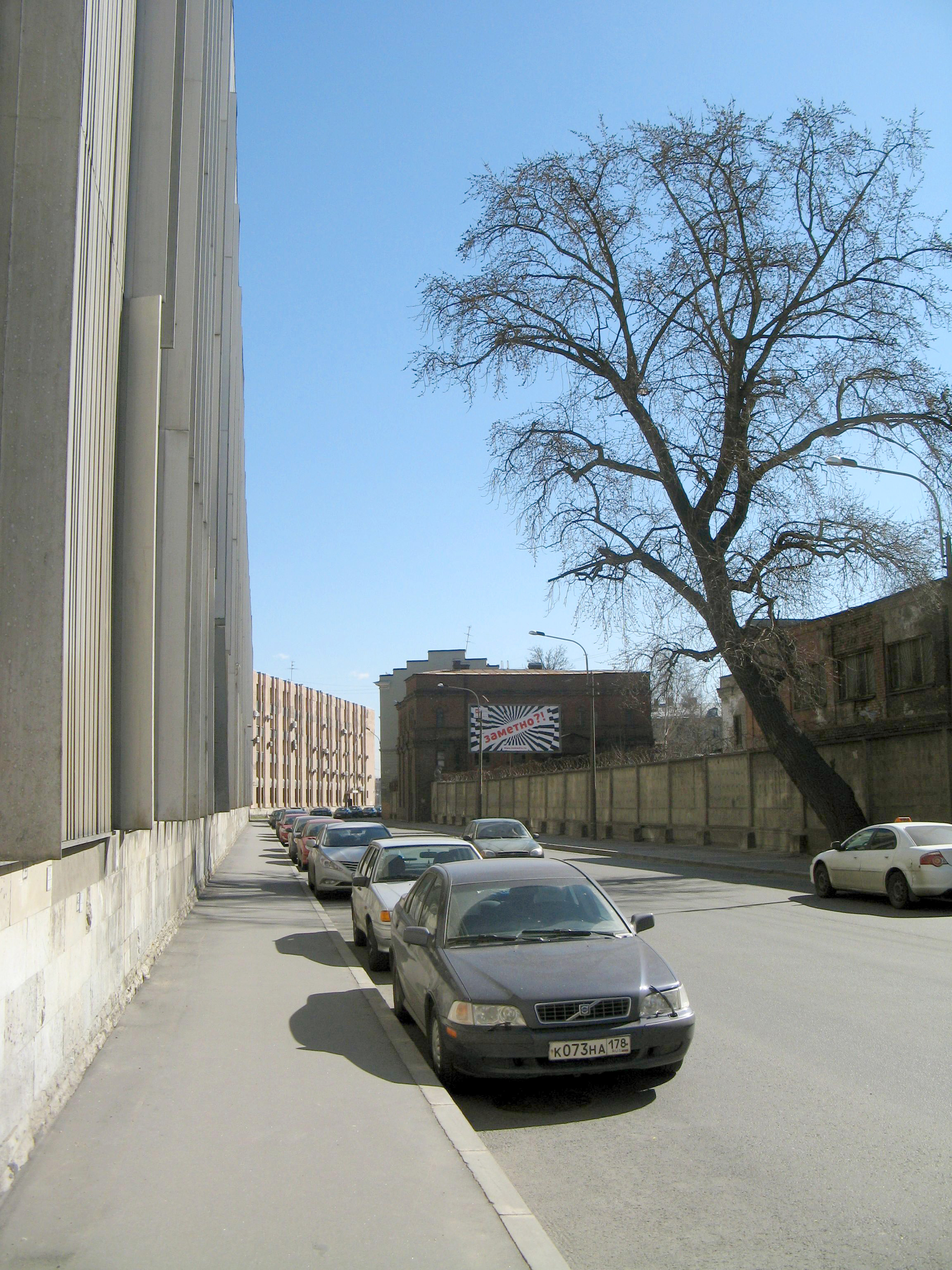 Улица Ватутина, Санкт-Петербург